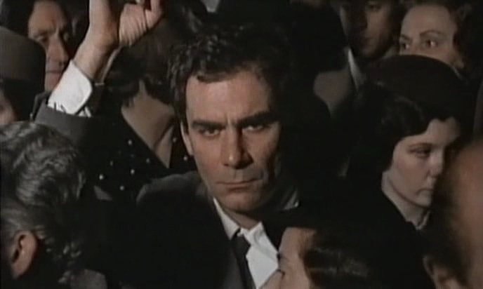 Screenshot del film Il sospetto di Francesco Maselli (1975)